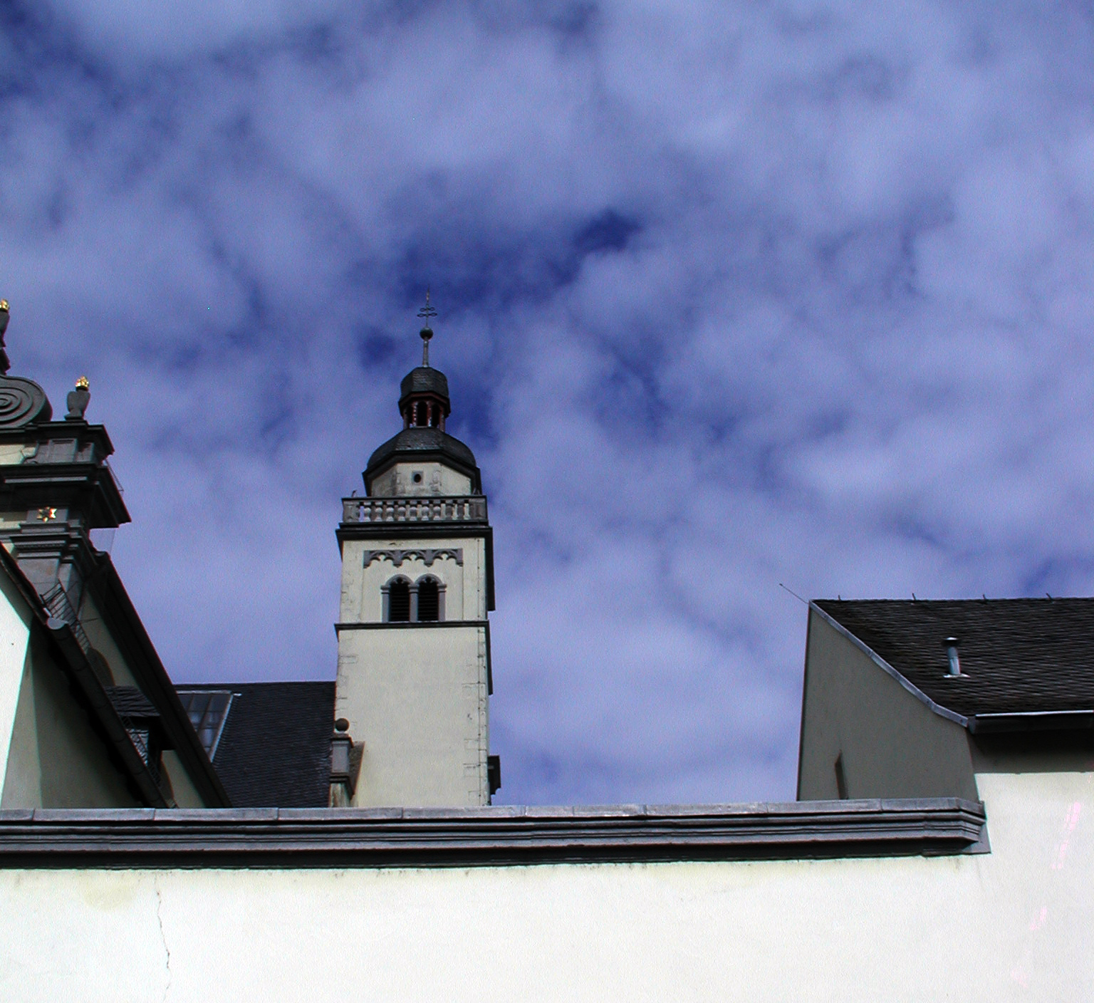 St. Maria vom Frieden, Köln